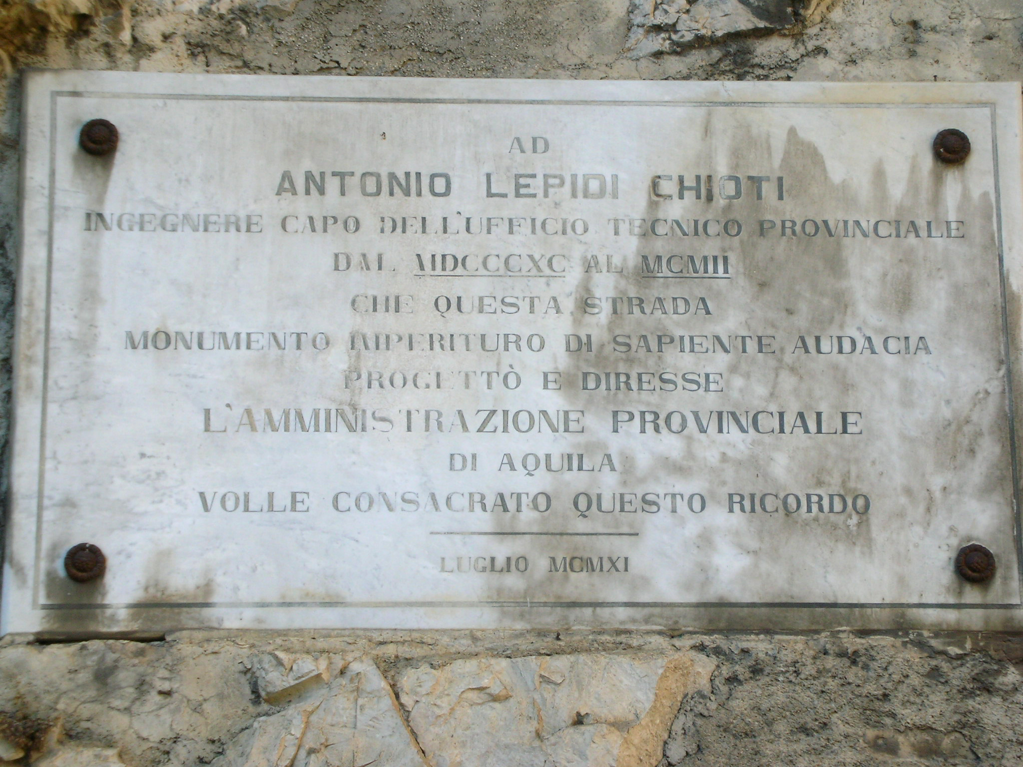 La lapide ad Antonio Lepidi Chioti posta sulle Gole del Sagittario. " A 50 mt sul greto del torrente, seguendo la curva del versante sinistro taglia la roccia con l'audace mezza galleria del Giardino in cui è incastrata una grande lapide marmorea per ricordare la bella vittoria dell'uomo che presiedette a questa impresa veramente monumentale" Vol 32 Società Geologica Italiana 1932